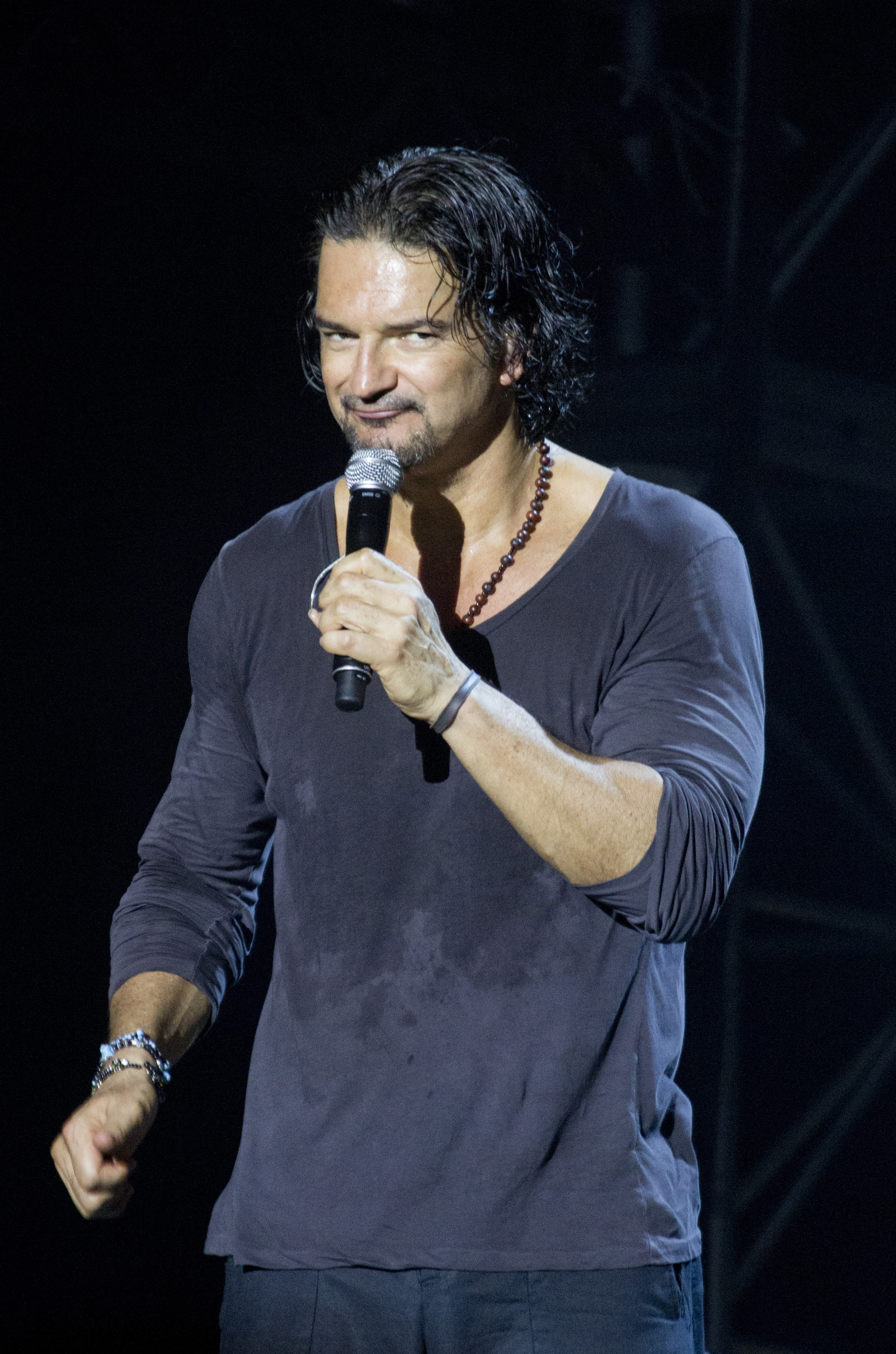 Ricardo Arjona en Nicaragua